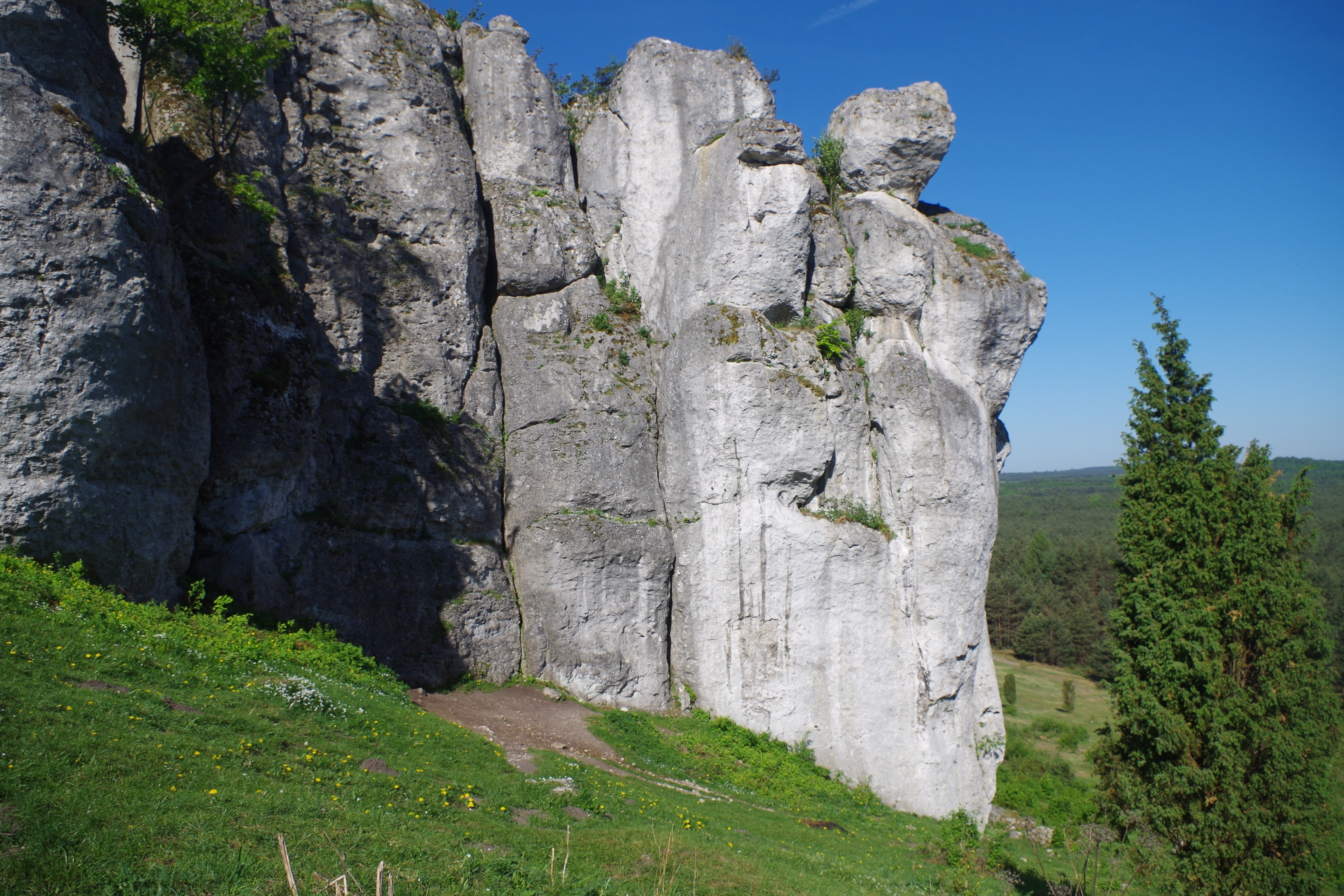 Grupa Turni Kukuczki w Mirowskich Skałach